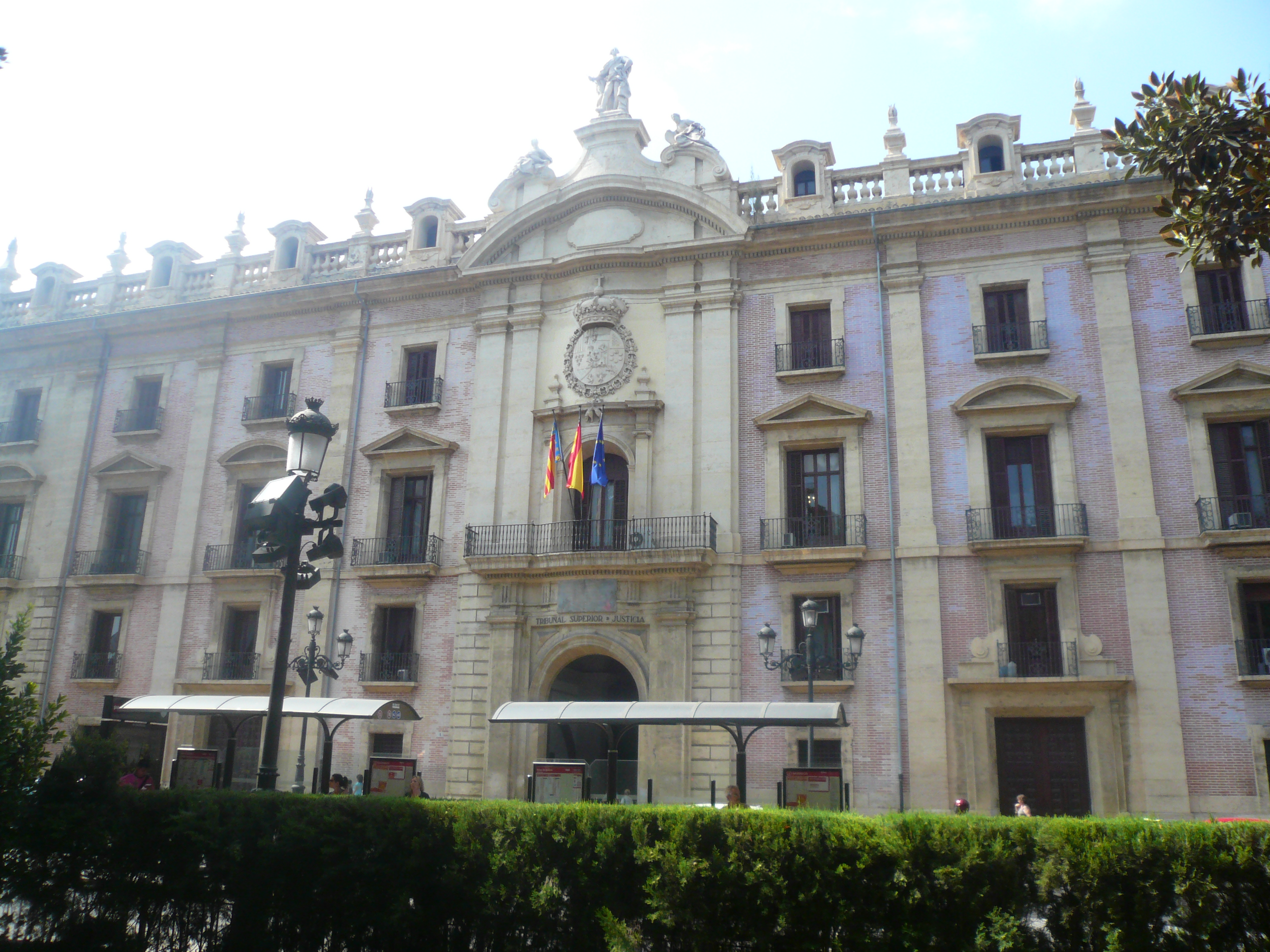 Palau de Justícia (València) Object location39° 28′ 19.1″ N, 0° 22′ 11.13″ W